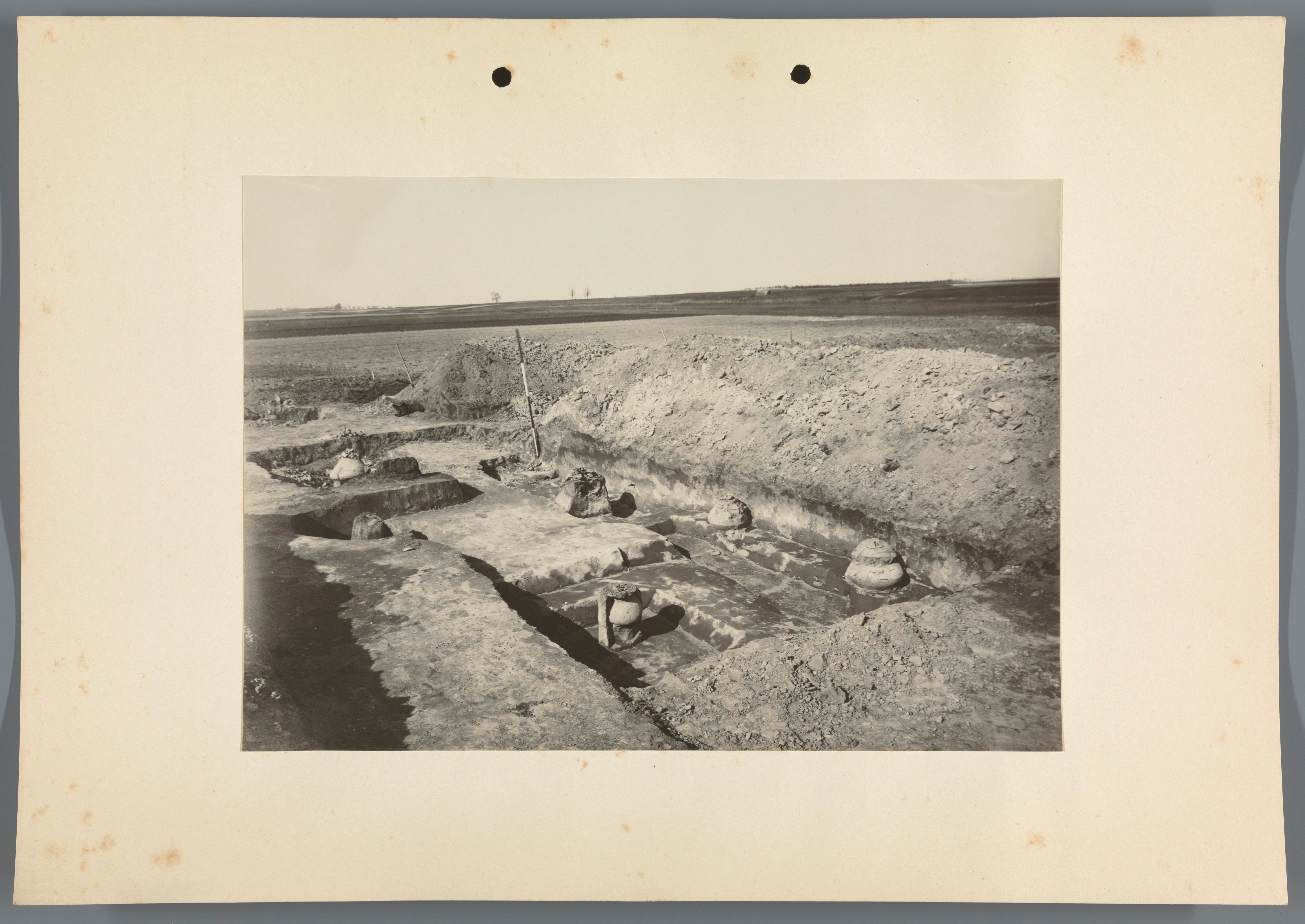 IdentificatieTitel(s): Hollandse Archeologische Expeditie in HongarijeObjecttype: foto Objectnummer: RP-F-00-6916-30Omschrijving: Binnengekomen via J.F. HeijbroekVervaardigingVervaardiger: fotograaf: A.E. GiffenPlaats vervaardiging: HongarijeDatering: ca. 1928Techniek: ontwikkelgelatinezilverdrukAfmetingen: h 155 mm × b 220 mmD Verwerving en rechtenCopyright: Publiek domein